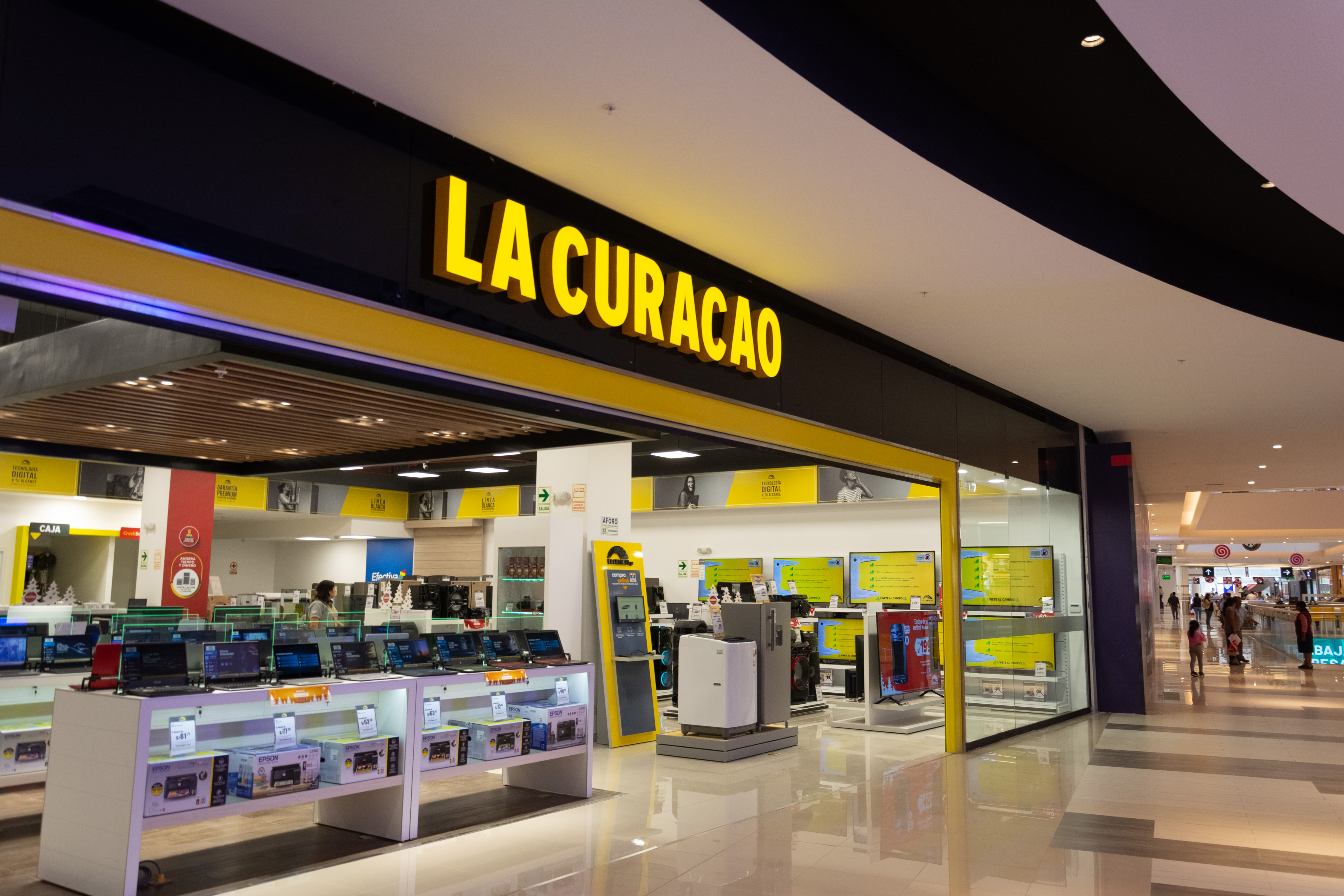 Tienda de La Curacao